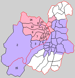 長野県南安曇郡の町村。